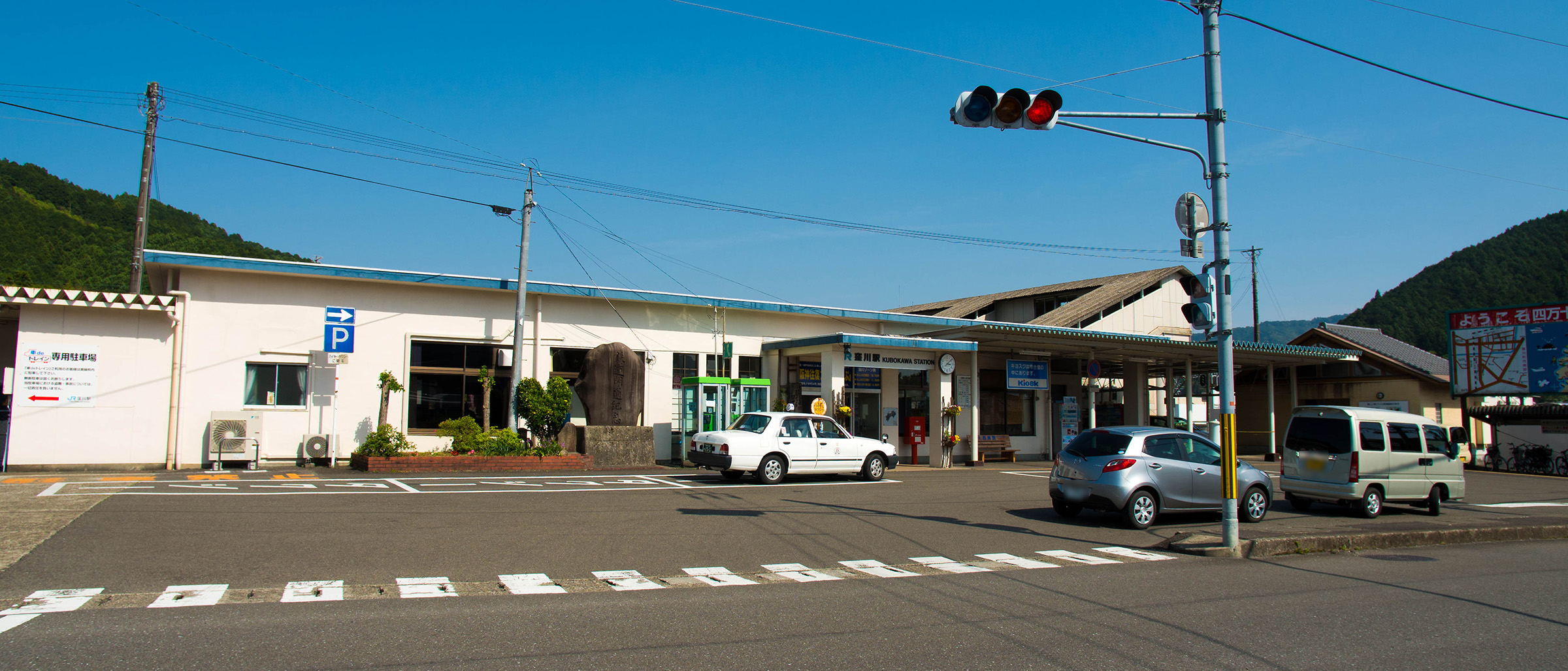 四国旅客鉄道株式会社土讃線窪川駅駅舎